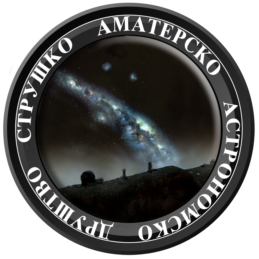 Лого на Струшко Аматерско Астрономско Друштво